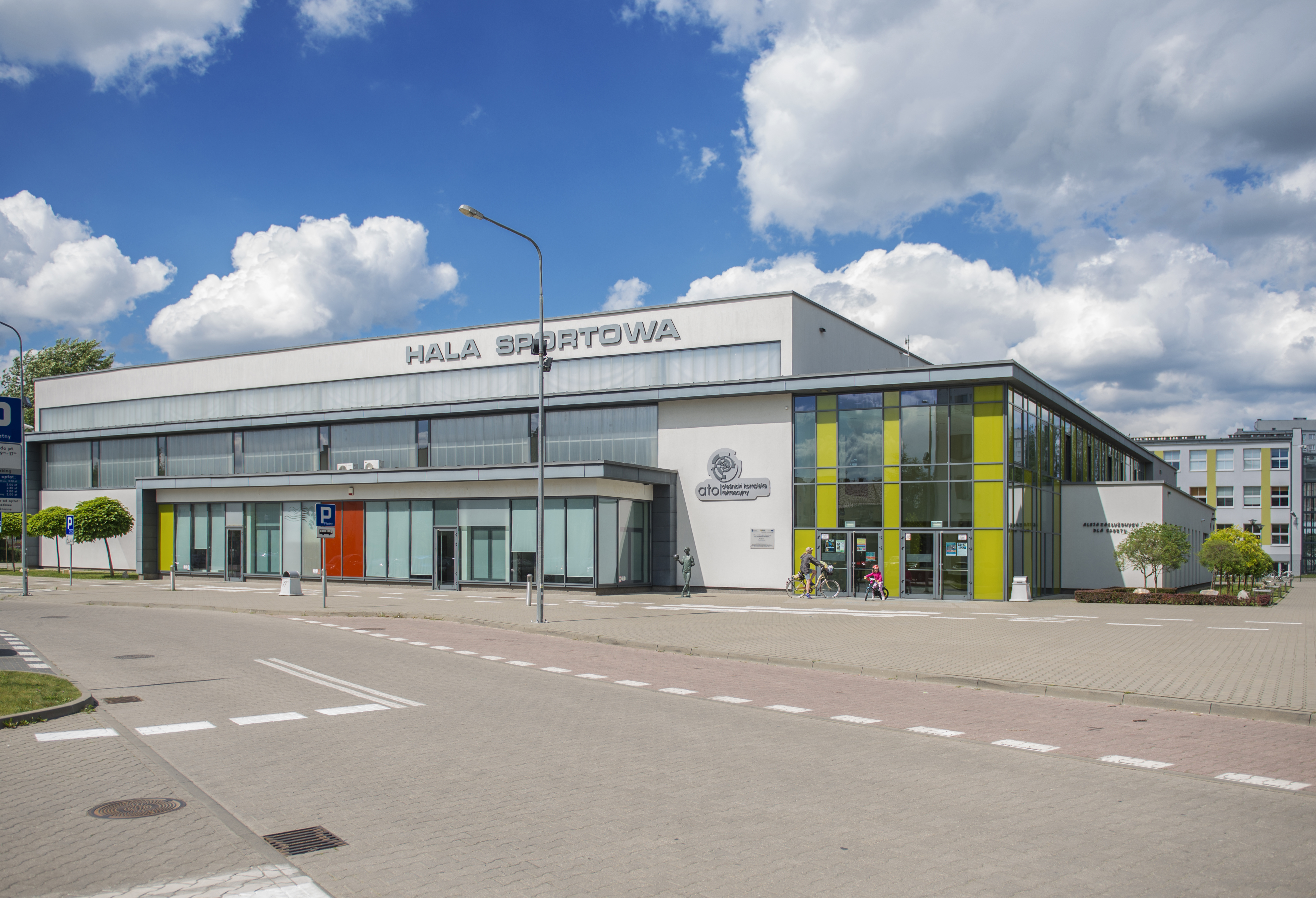 Hala Sportowa ATOL